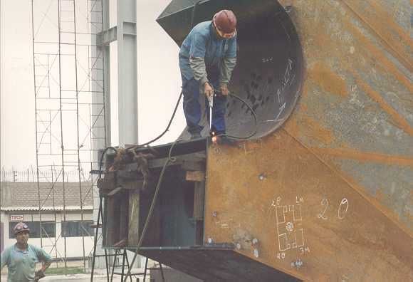 Comentario: Construyendo, en el taller, una de las piezas del nuevo puente Bolognesi, a ser construido en Piura, Perú Proyectista del Puente: C.Lotti & Associati - Roma Director de Proyecto: Ing. Alfredo Bianco Calculista responsable: Ing. Doumitrescu Autor: Alfredobi Lugar: Chimbote, Perú Fecha: Aproximada 2002